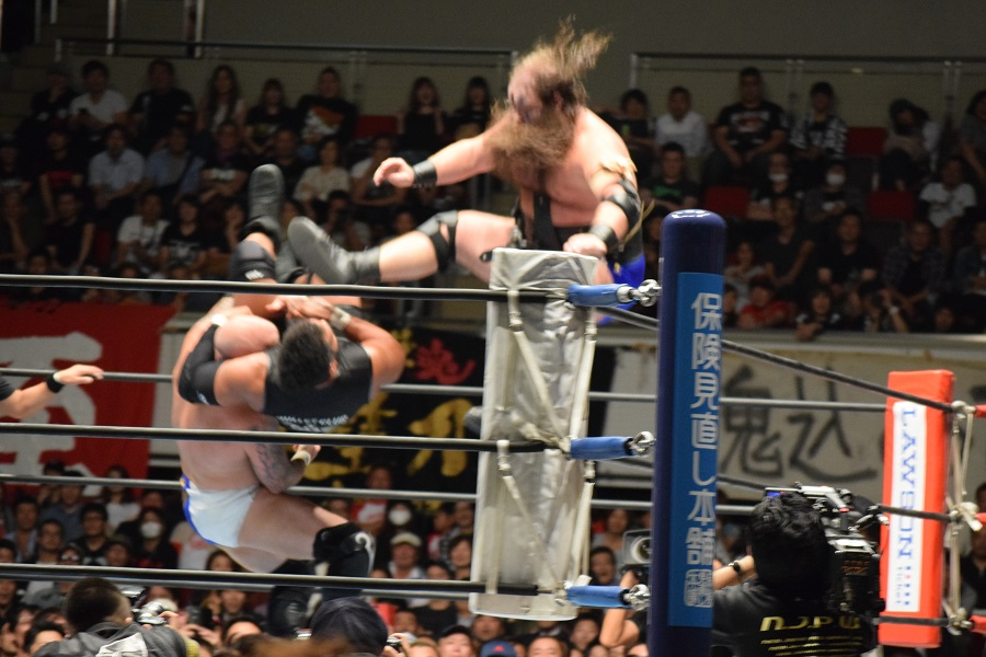 2017年9月24日 ワールド記念ホール「DESTRUCTION in KOBE」 タンガ・ロアにフォールアウトを仕掛けるウォー・マシン（レイモンド・ロウ & ハンソン）